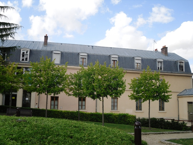 L'école Notre-Dame de Viry-Châtillon (91)